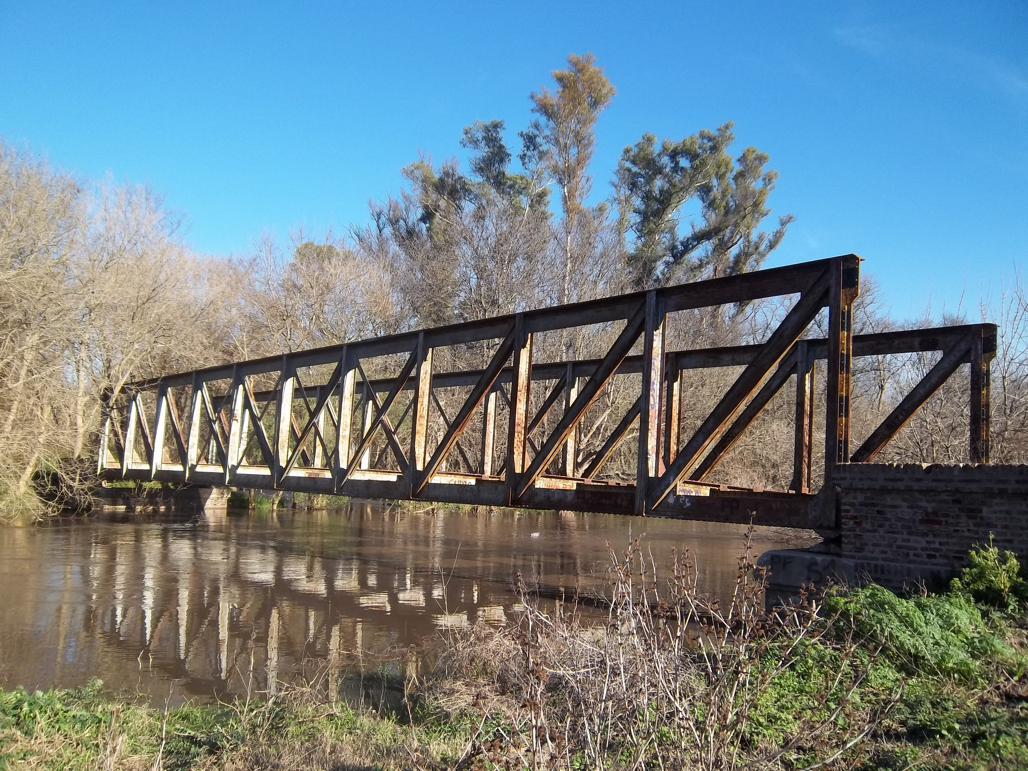 Puente del ramal G3 del ferrocarril Belgrano sobre el río Matanza que divide los partidos de La Matanza y Ezeiza. Tomado desde González Catán, partido de La Matanza, provincia de Buenos Aires, Argentina.